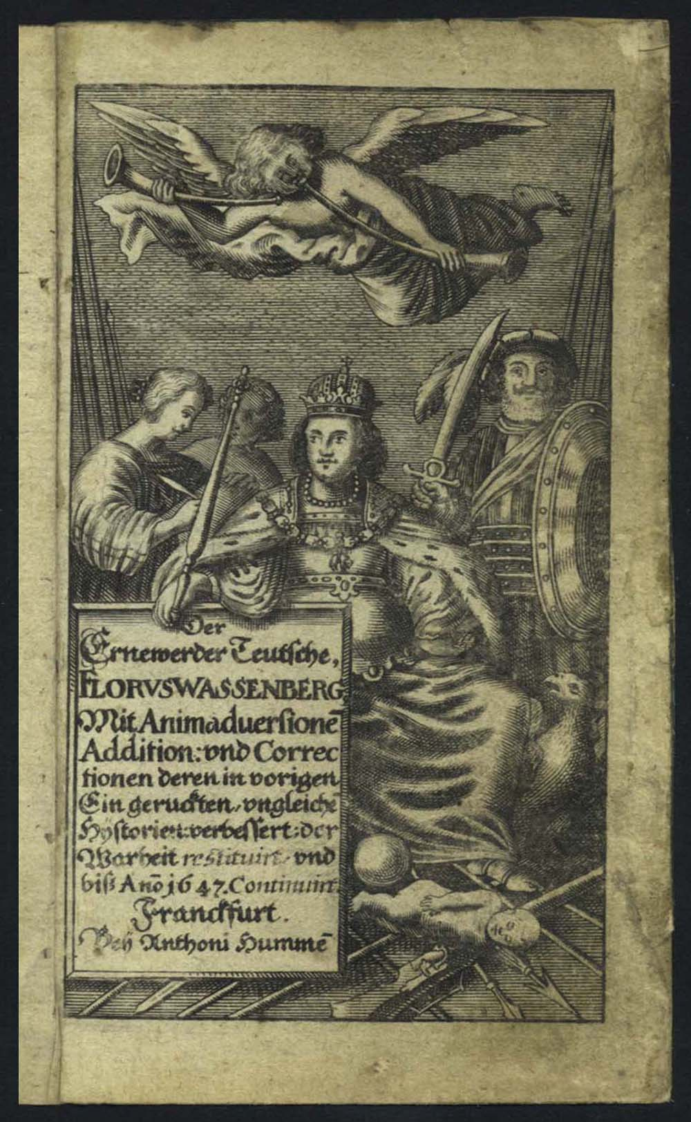 Ein Inhaltsverzeichnis befindet sich unter Geschichte des Dreißigjährigen Krieges.